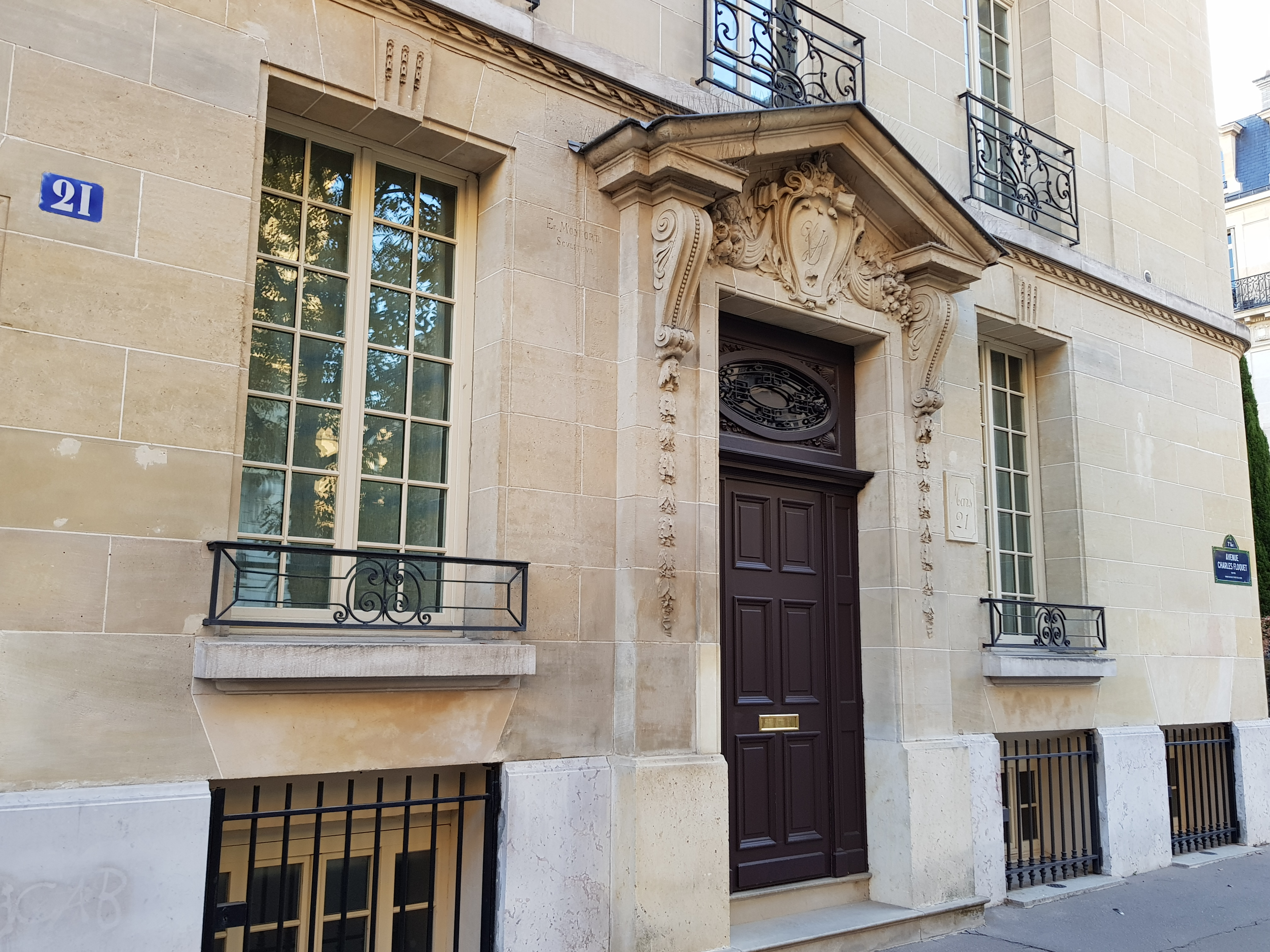 21, avenue Charles-Floquet, Paris 7e.